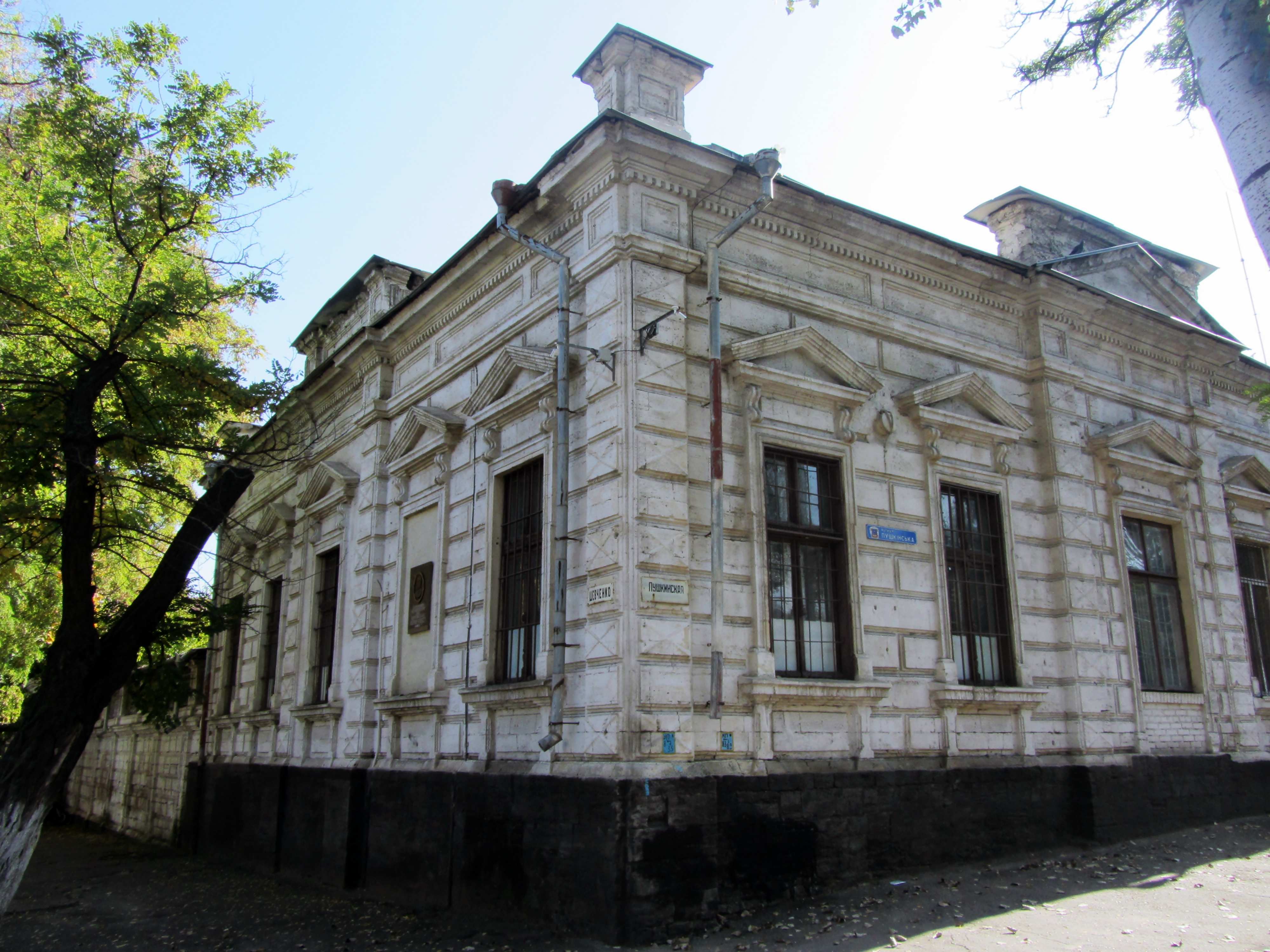 Ансамбль будівель громадського призначення, Миколаїв, вул. Шевченка, 45 ( 2 будинки)